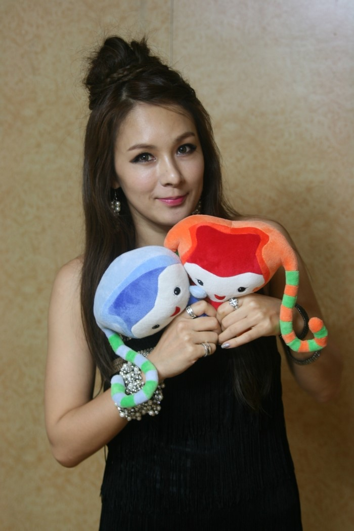 2012년 7월 2일 여수 팝페스티벌에서 채연.